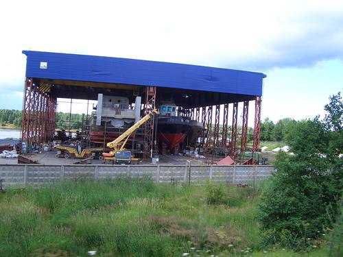 Верфь в г. Отрадное